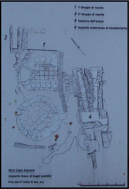 Planimetria dei Bagni di Gela. L'immagine è un ritaglio di una fotografia auto prodotta che aveva per soggetto il segnale turistico del complesso archeologico. Spero di poter inserire una copia dell'originale rilievo (proprietà della Soprintendenza di Caltanissetta). Categoria:Gela